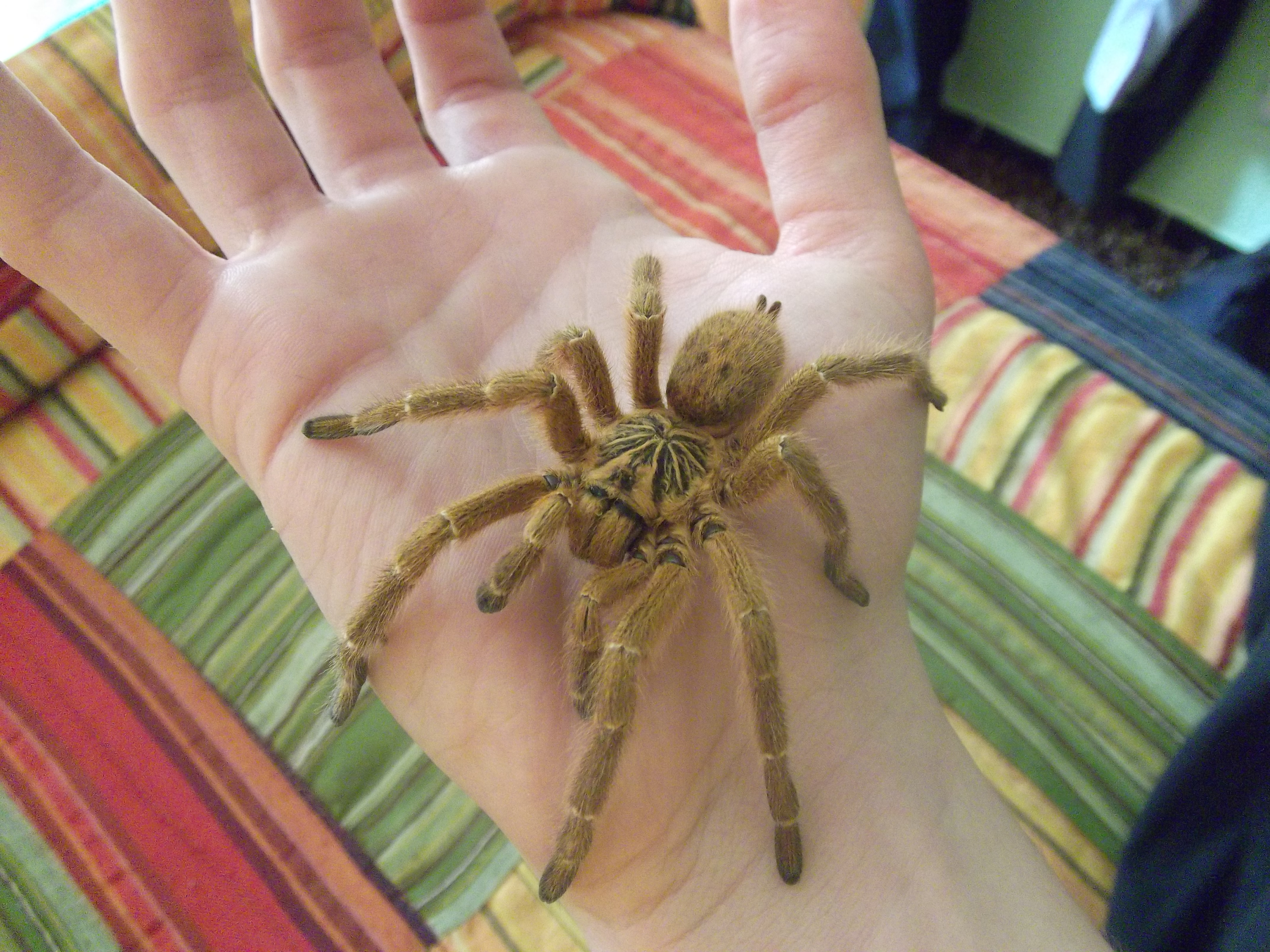 Mascle de l'espécie Pterinochilus murinus